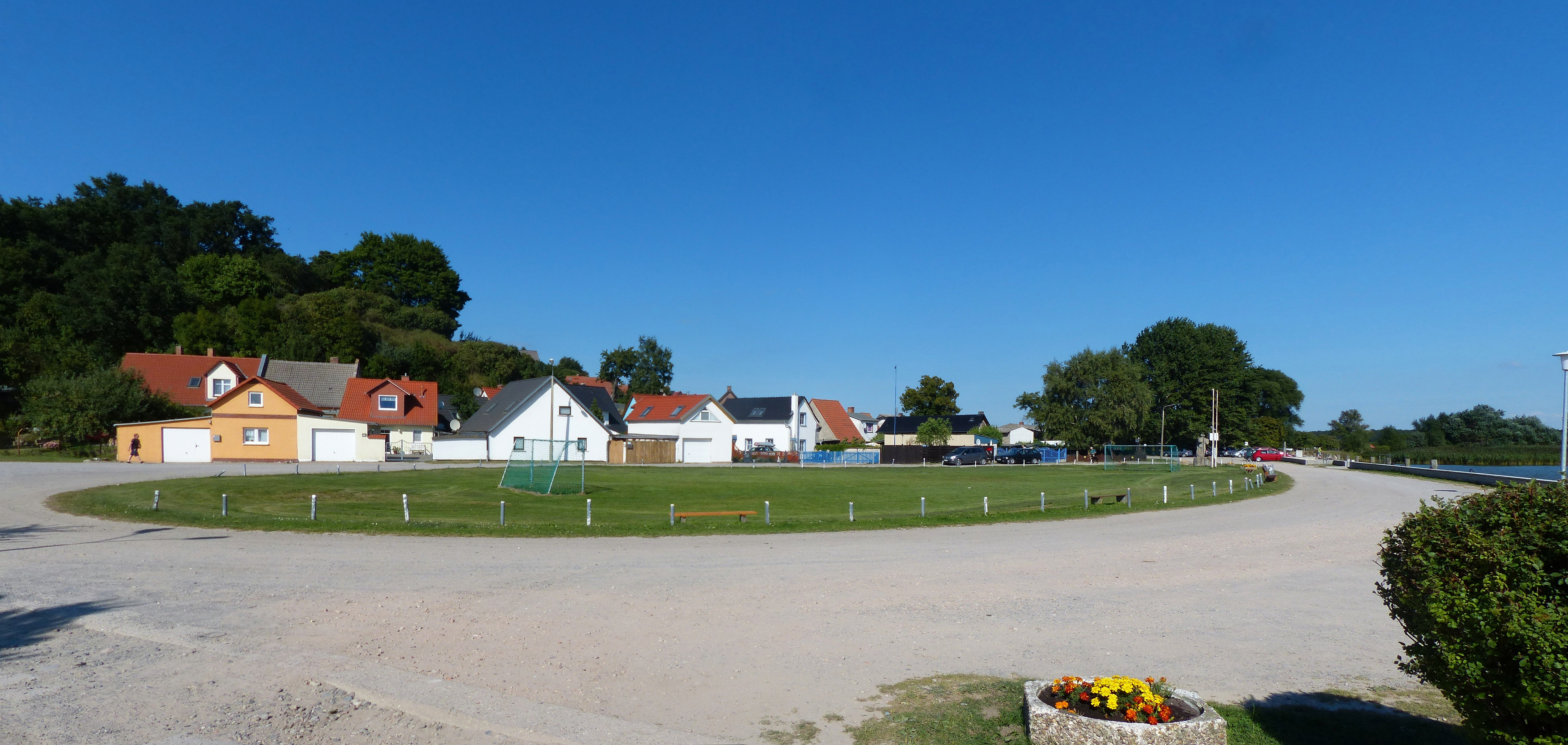 Kamminke, Dorfplatz am Hafen